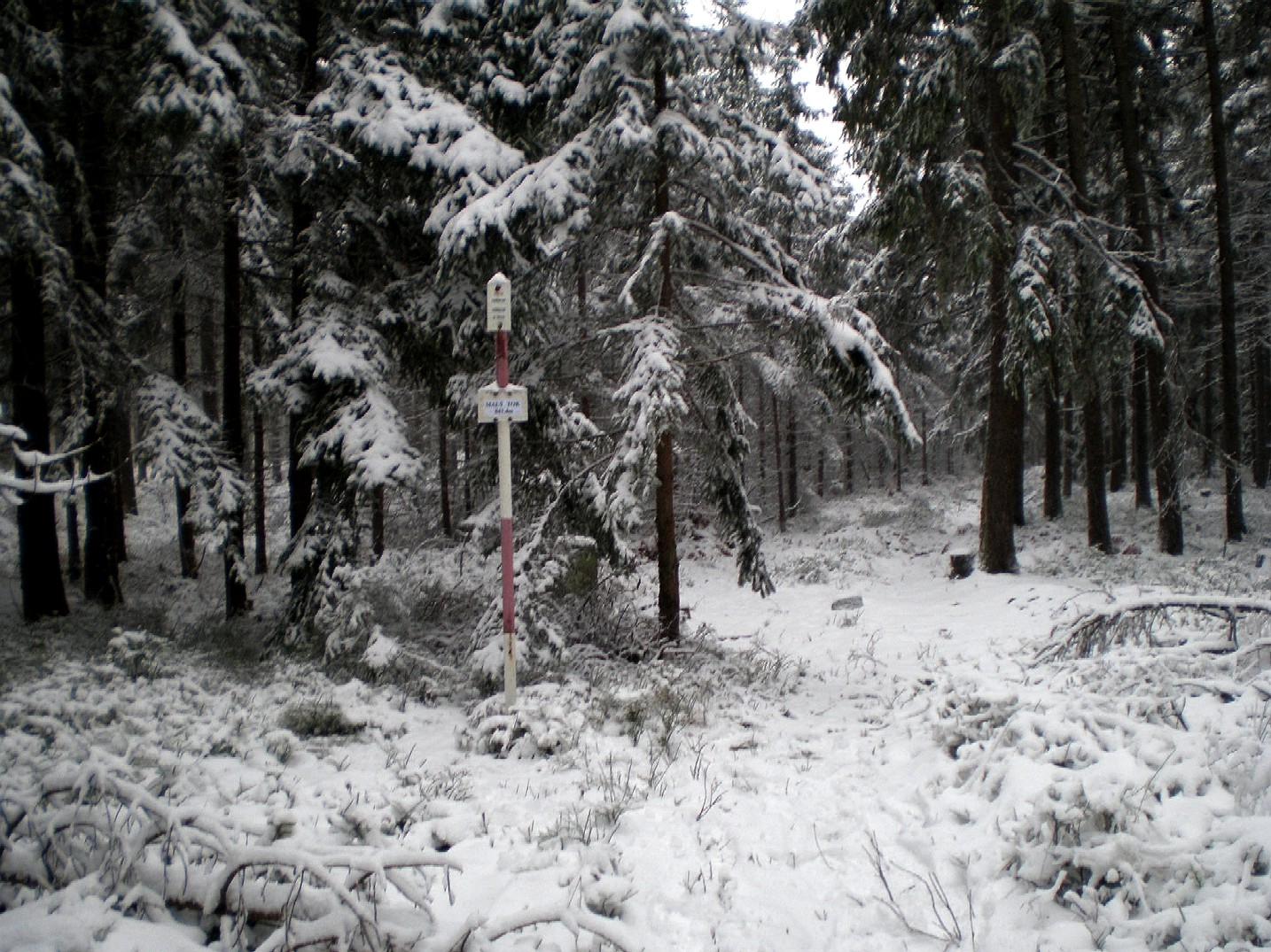 Vrchol Malého Toku (844 m)